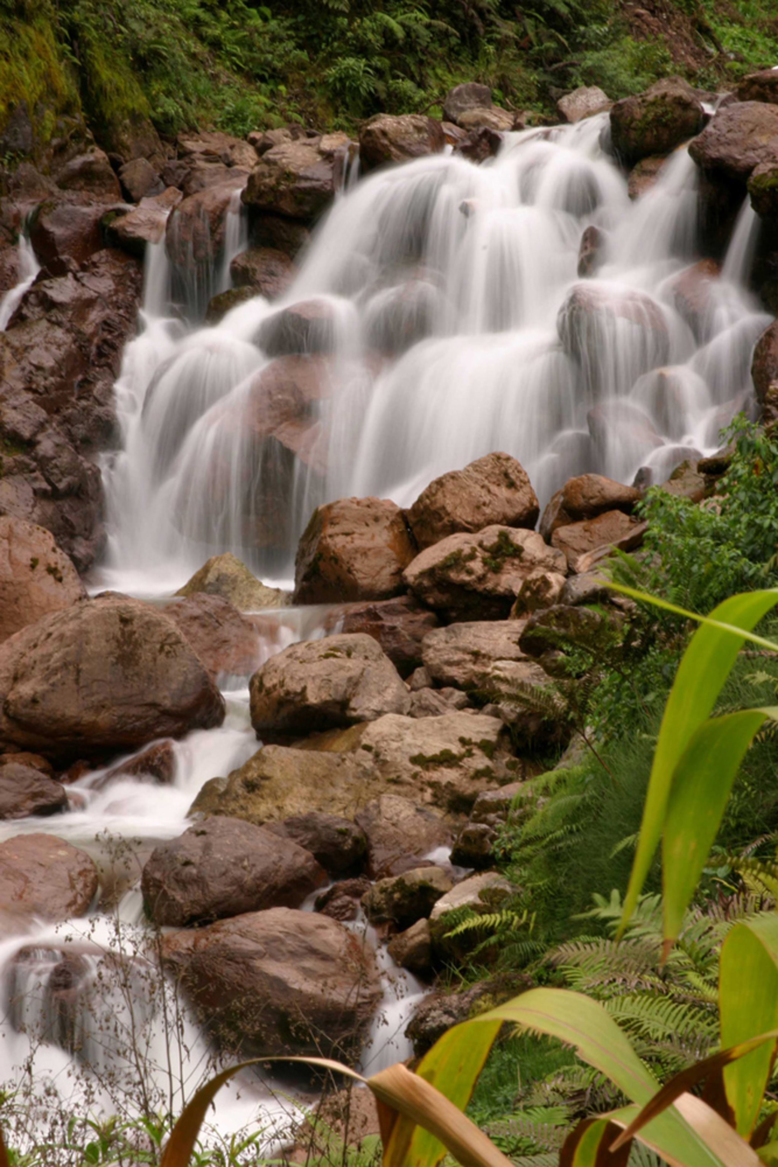 Air Terjun Utikini sangat khas, yakni pada aliran sungai yang berbatu